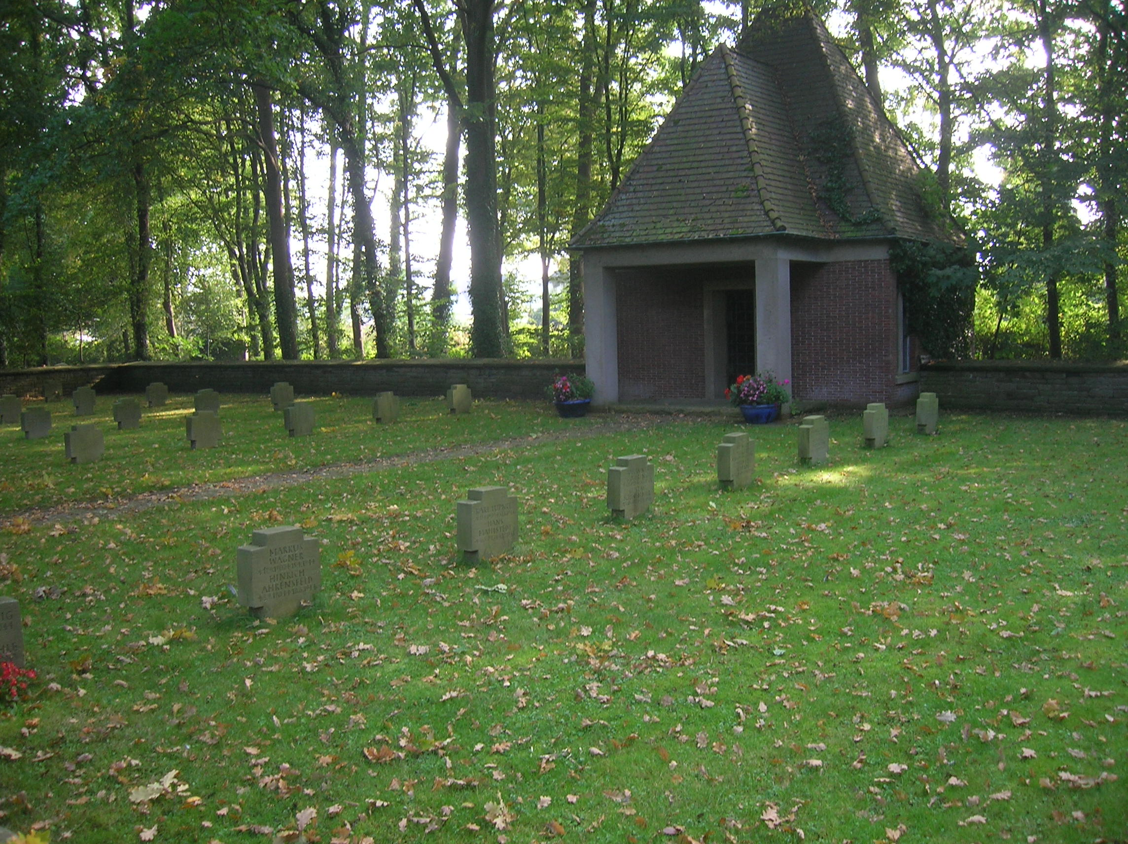 Denkmal für 252 Wehrmachtsangehörige, 99 bei den Luftangriffen auf Wesermünde umgekommene Zivilisten und 9 Ausländer.